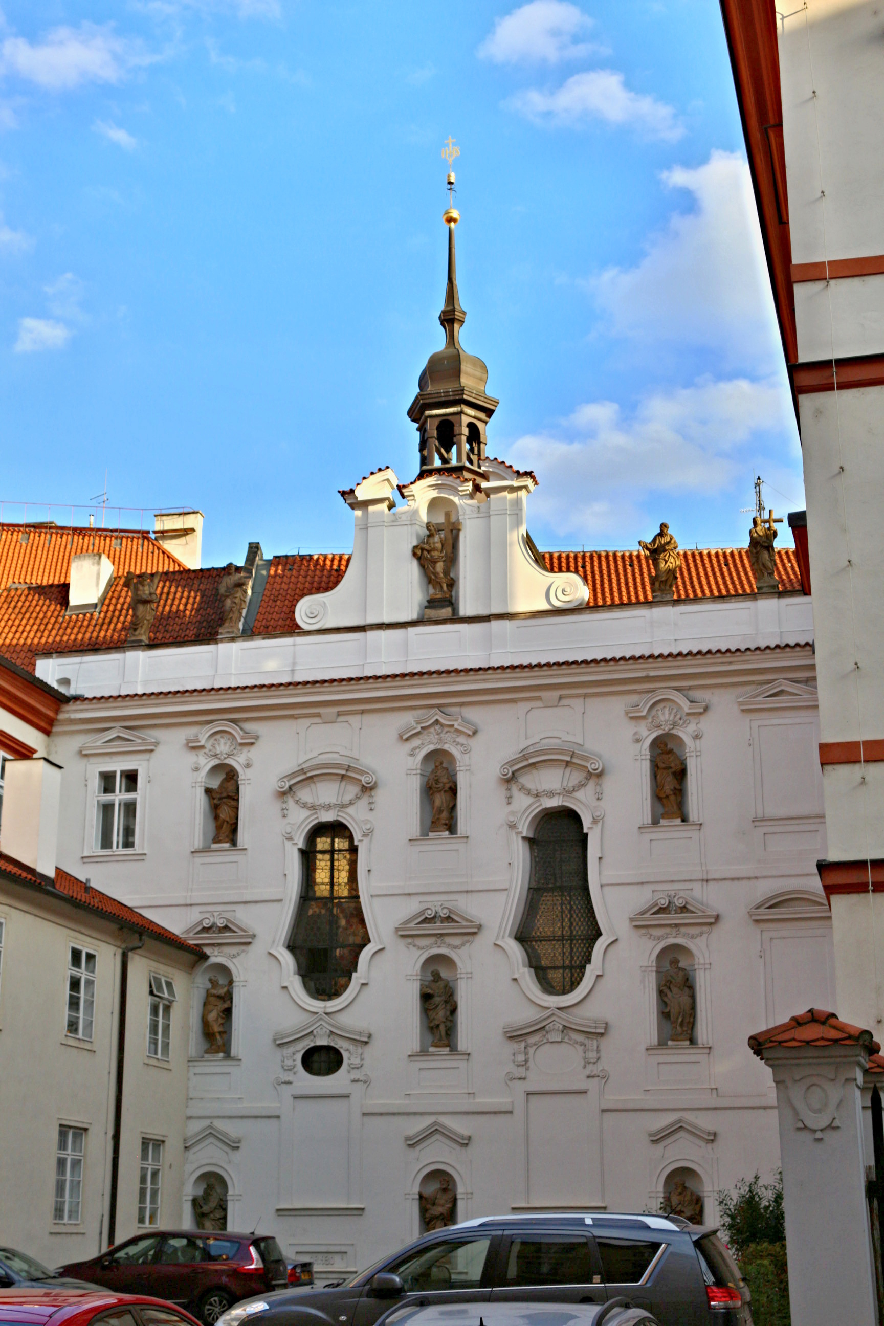 Kostel svatého Bartoloměje v Praze